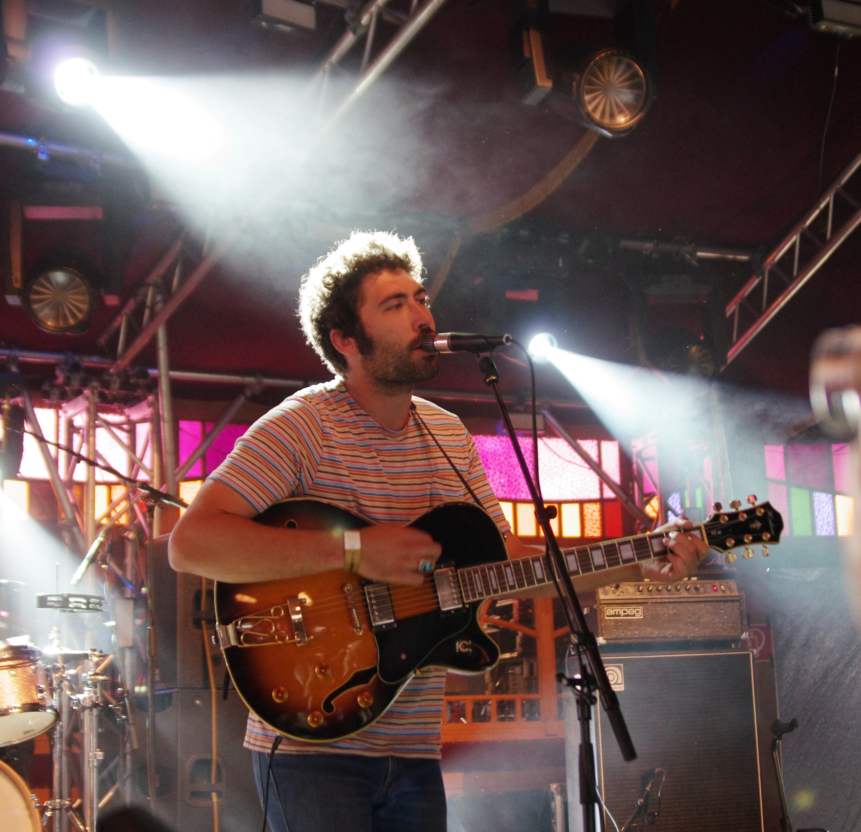 Allah-Las beim Haldern Pop Festival 2013. Besetzung: Matthew Correia (percussion); Spencer Dunham (bass); Miles Michaud (vocals, guitar); Pedrum Siadatian (lead guitar)